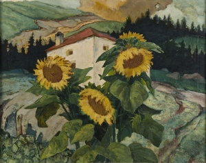 Gustav Wiethüchter Sonnenblumen